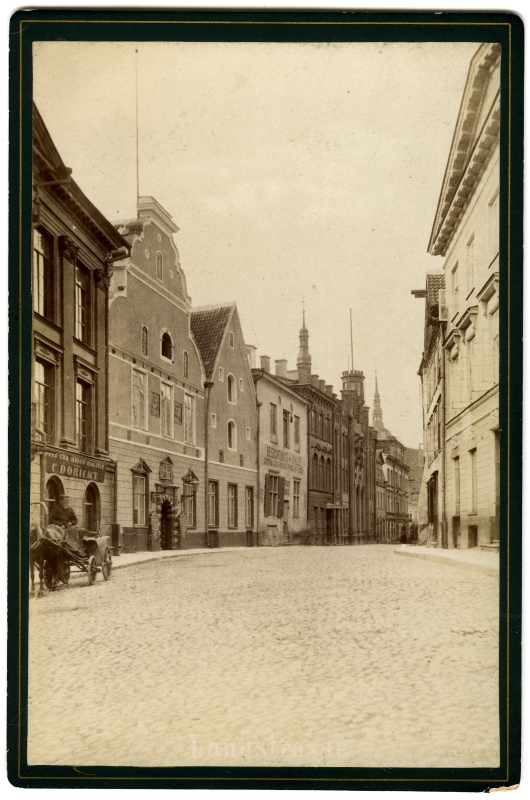 Pikk tänav Mustpeade hoonega ja Kanuti Gildi majaga, vaadatuna Olevimäe poolt